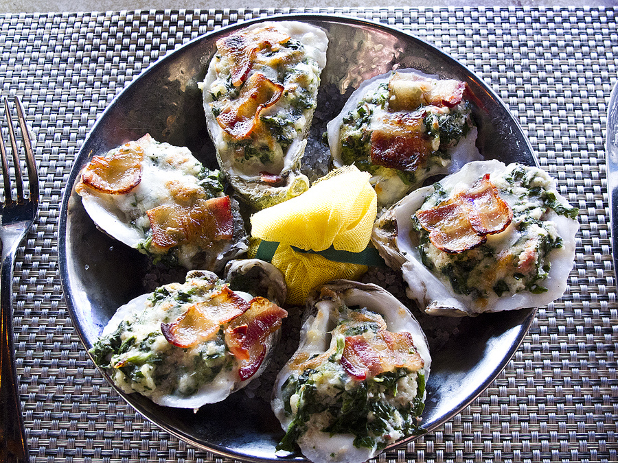 Virginia Beach-Catch31 Restaurant - Oysters Rockefeller